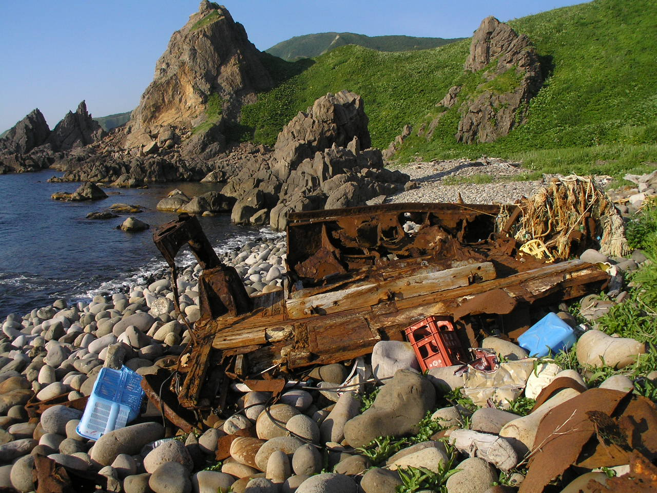 積丹半島の沈船